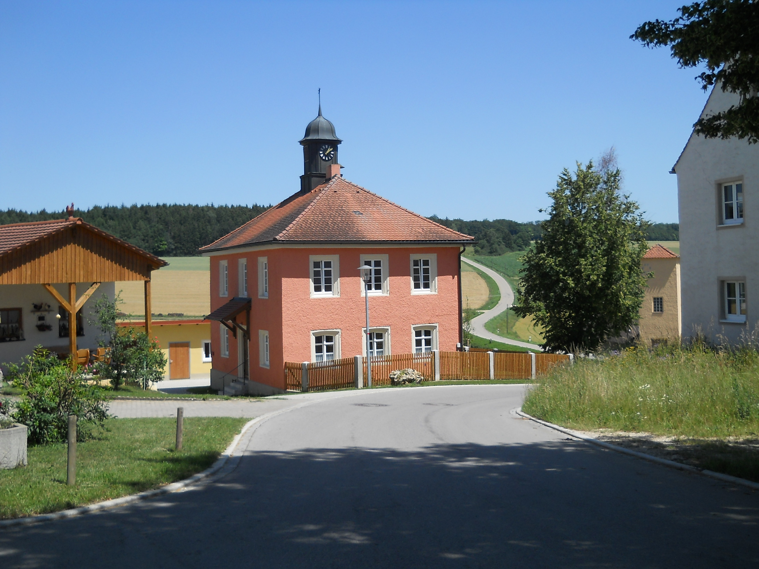 Oberheumödern, Ortsteil von Treuchtlingen im mittelfränkischen Landkreis Weißenburg-Gunzenhausen, ehemaliges Schul- und Gemeindehaus des 19. Jahrhunderts